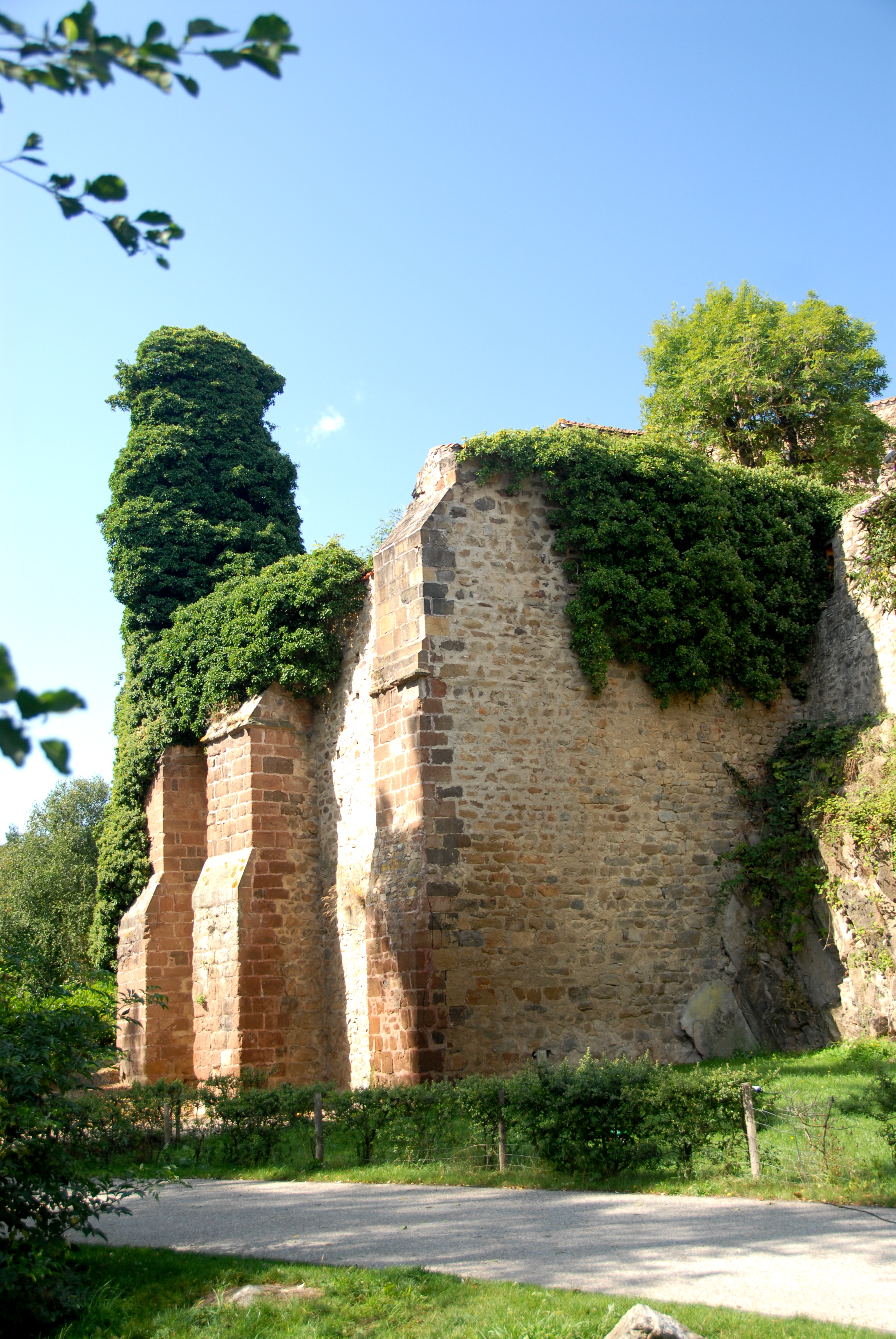 Lavaudieu, Wehrmauern im Talgrund, vermutlich Reste eines Donjon